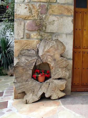 Maison à Zubieta Pyrénées).